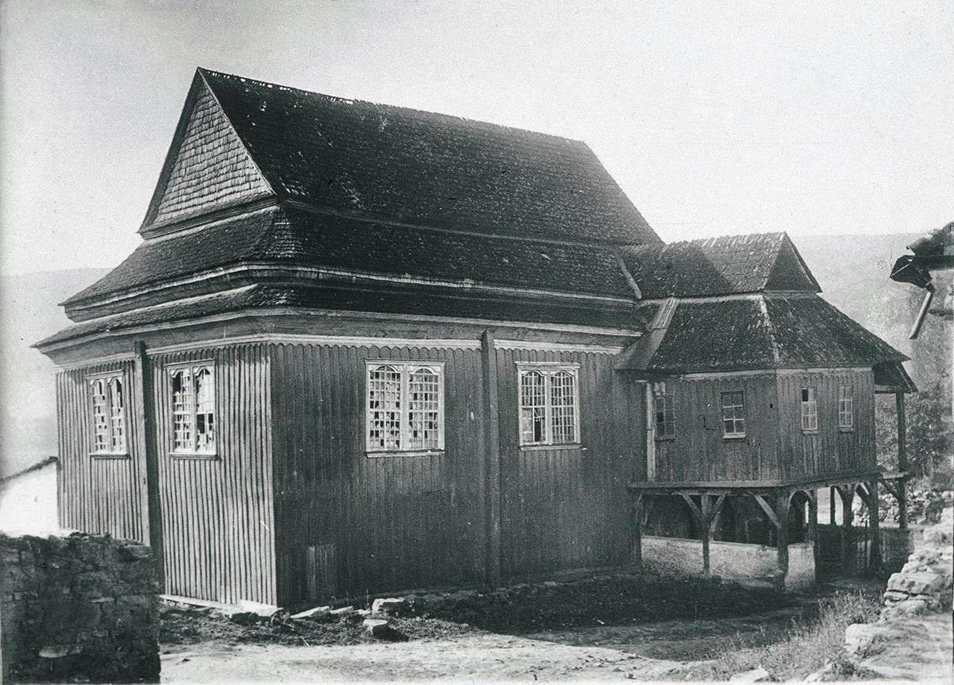 Деревянная синагога в Ярышеве, архивное фото экспедиции П. Жолтовского.